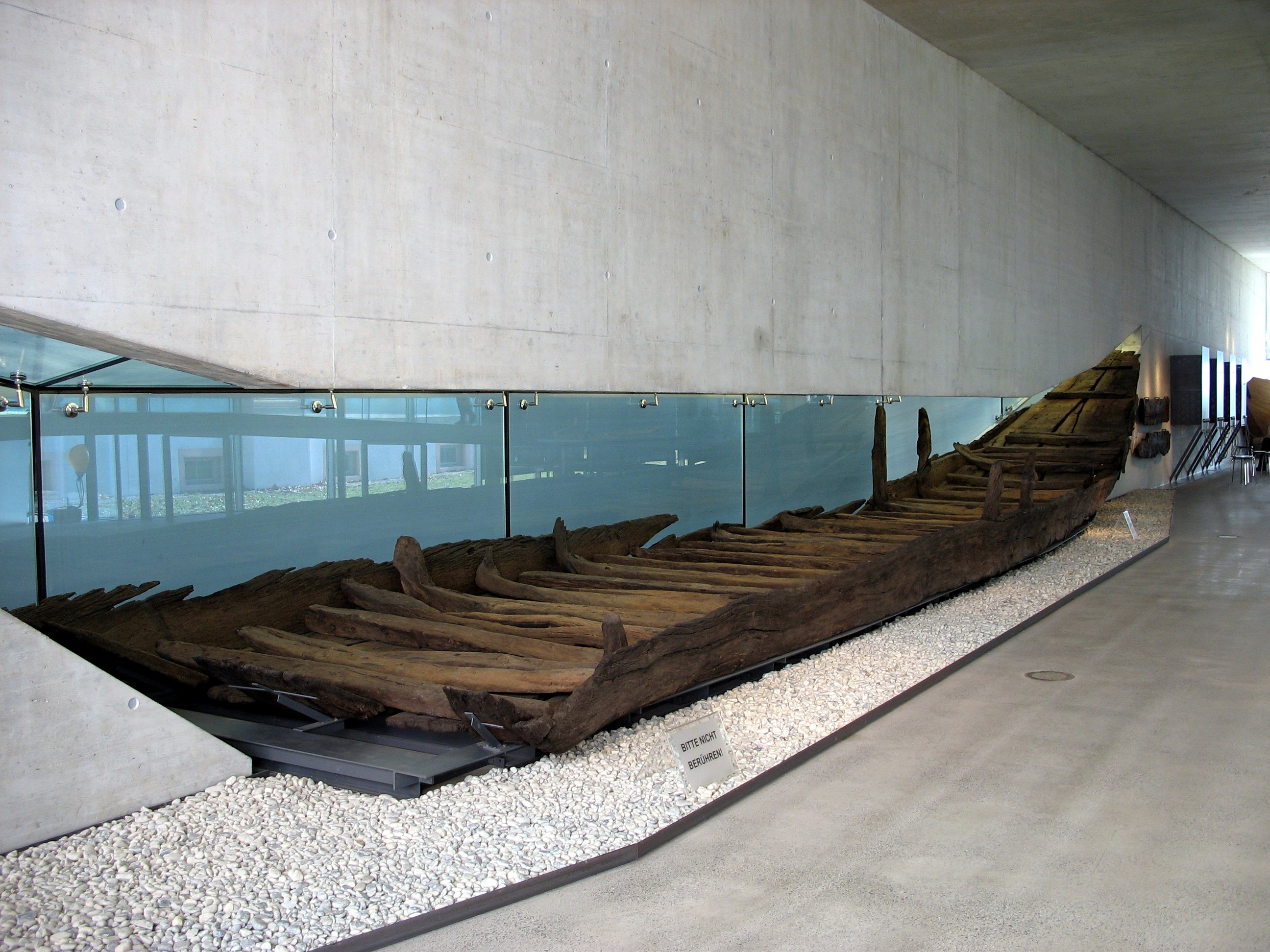 Description: Mittelalterlicher Lastensegler, gefunden 1981 im Bodensee vor Immenstaad. Archäologisches Landesmuseum Konstanz Photographer: User:Opodeldok